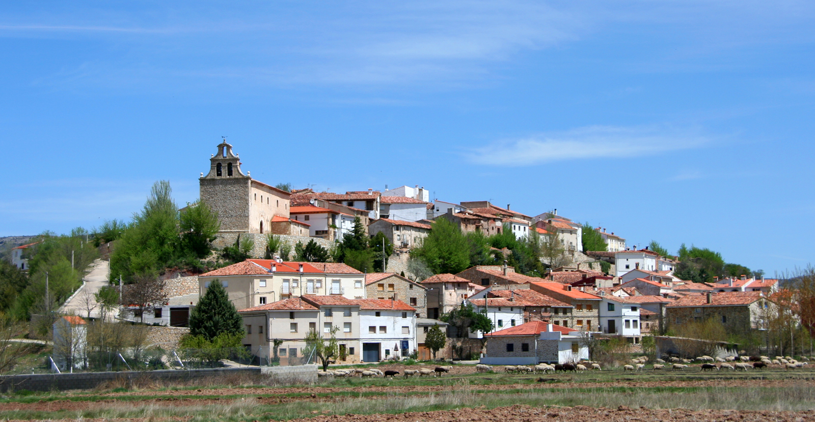 Salinas del manzano